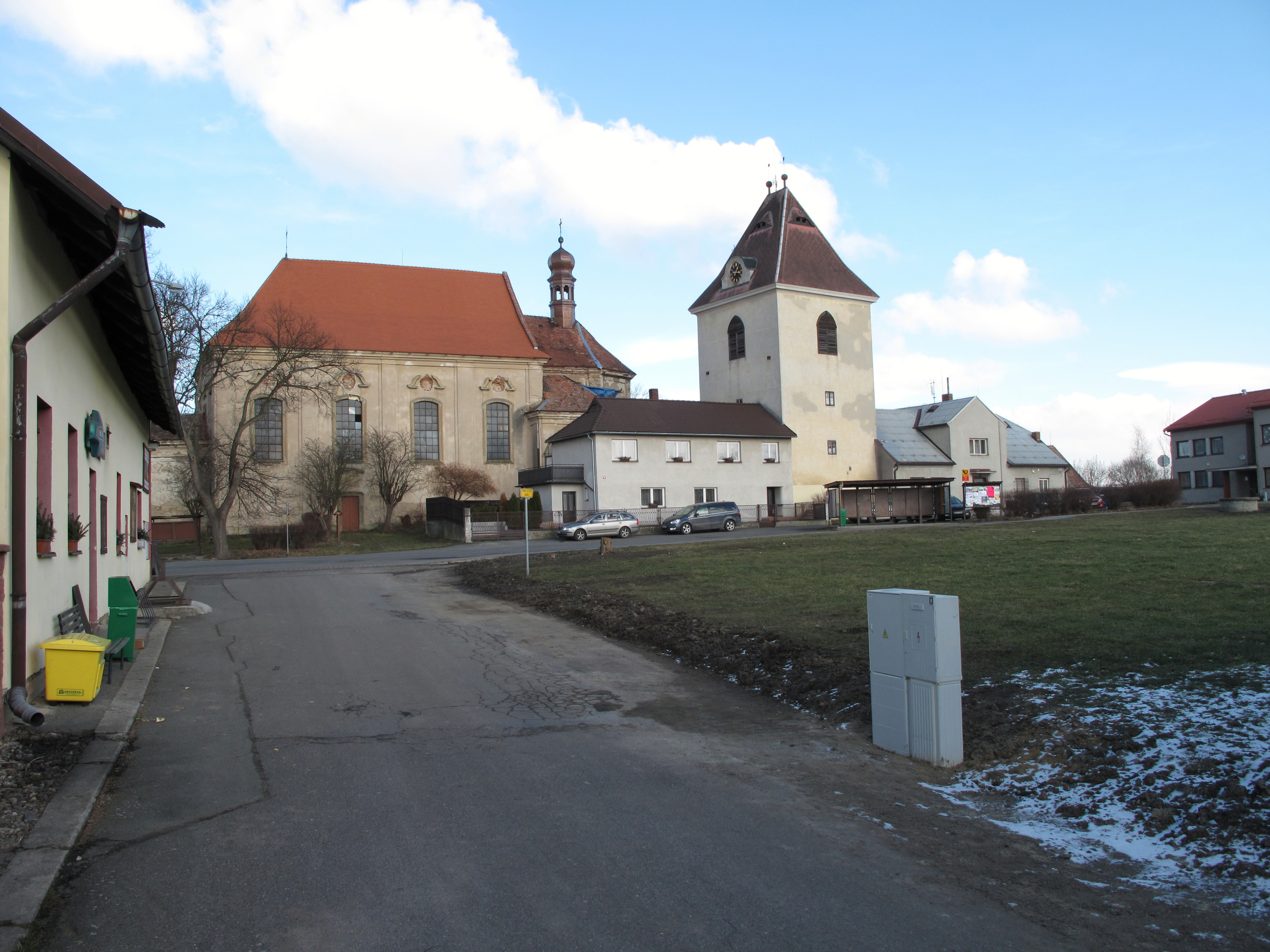 Náves v Březně. Okres Mladá Boleslav, Česká republika.